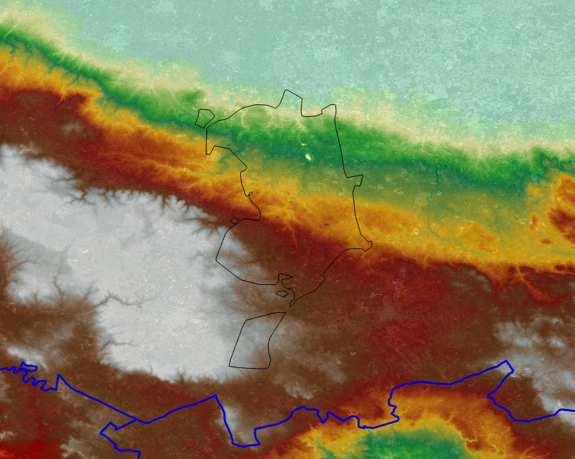 Digital Terrain Model del territorio di Acquaviva delle Fonti. In nero i confini comunali, in blu quelli provinciali.